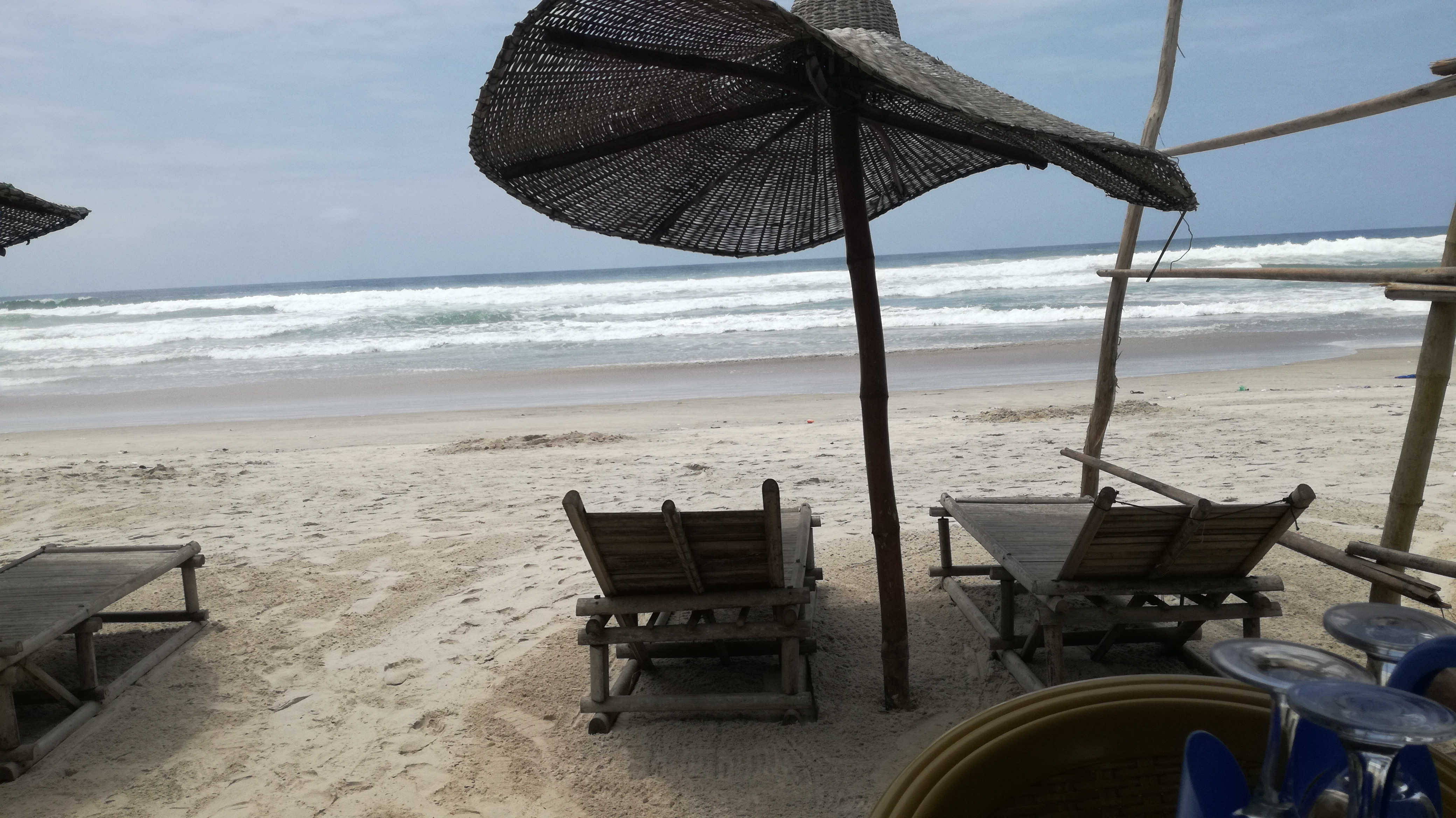 Plage d’une cité balnéaire dans le sud de la Côte d’Ivoire